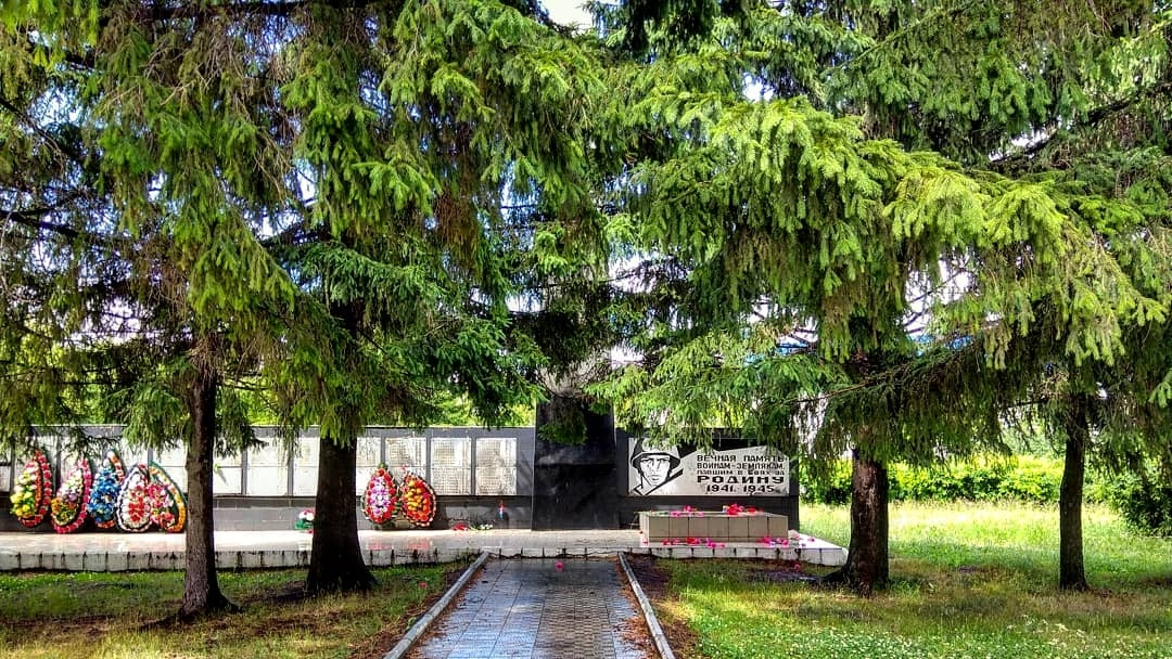 Памятник жителям села, погибшим в Великой Отечественной войне, Байкалово Свердловской области